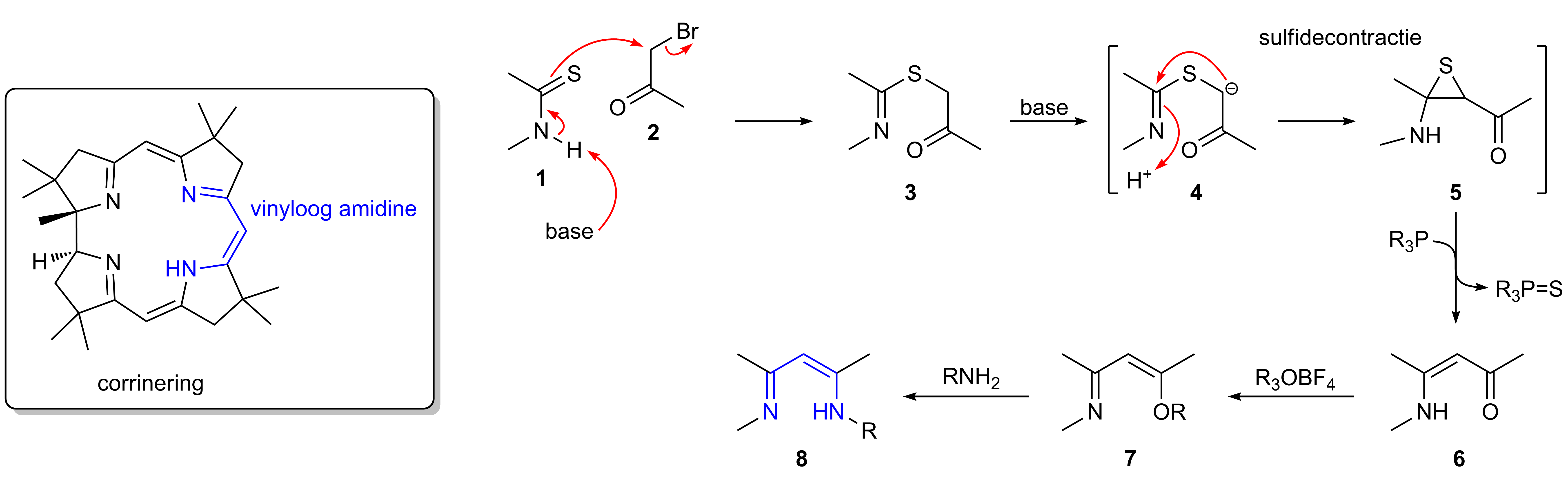 Sulfidecontractie corrinering volgens Eschenmoser (totaalsynthese vitamine B12)